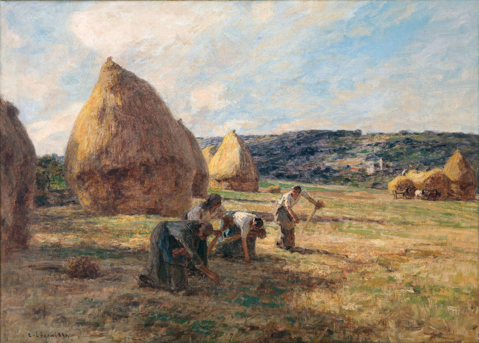 Les Glaneuses